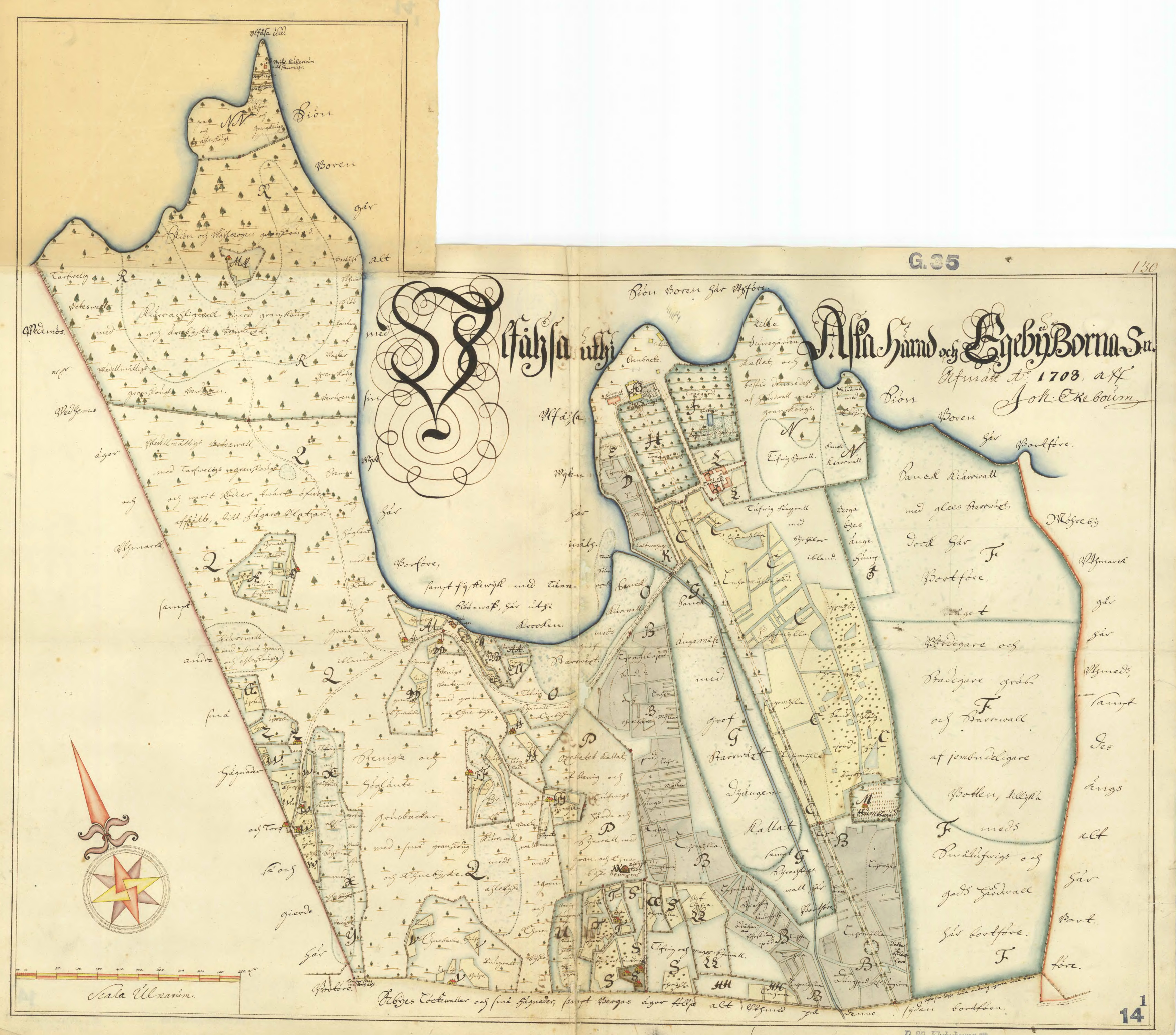 Karta över alla ägorna till egendomen Ulvåsa